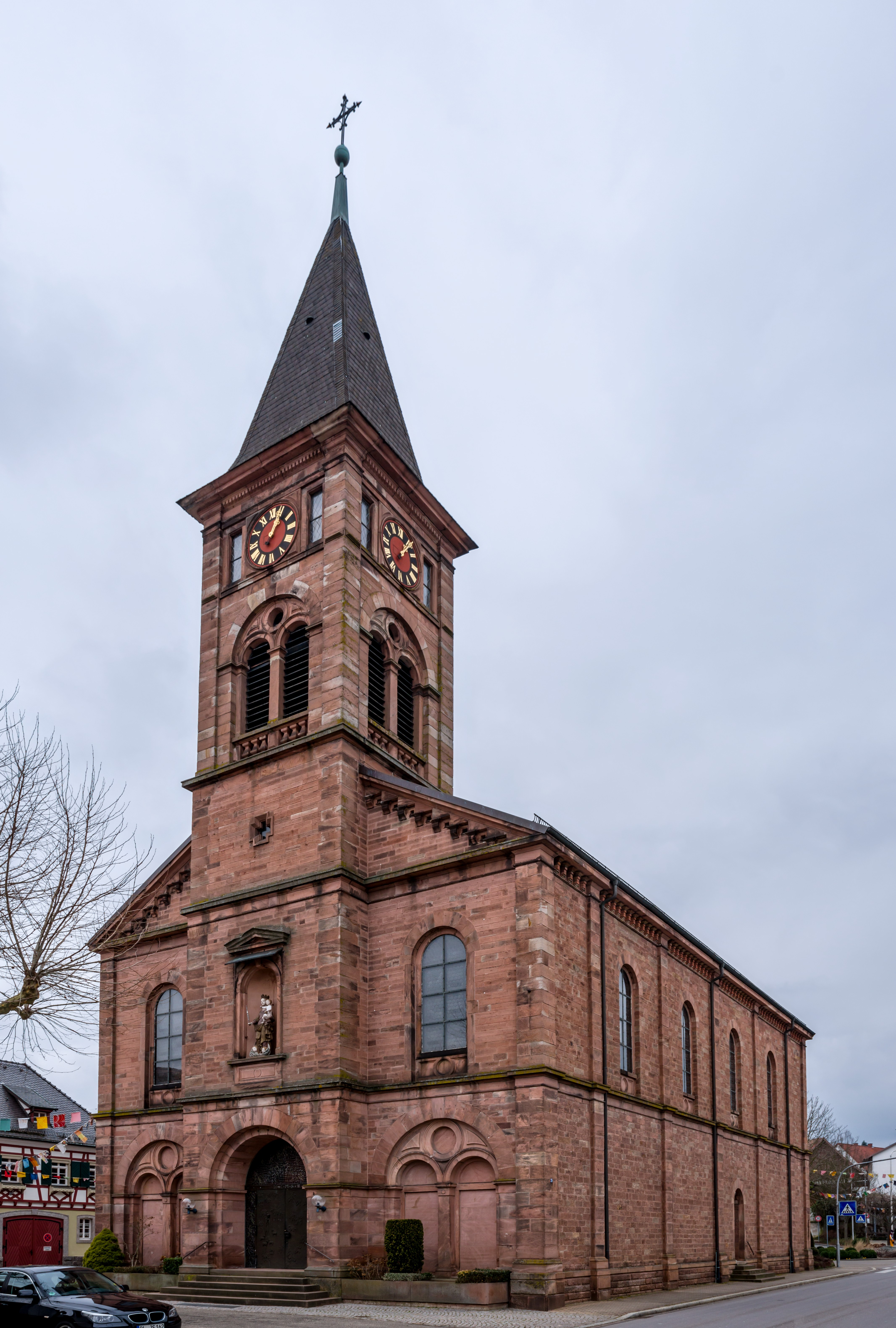 Bilder von der Tour Achern Offenburg am 10.02.2018